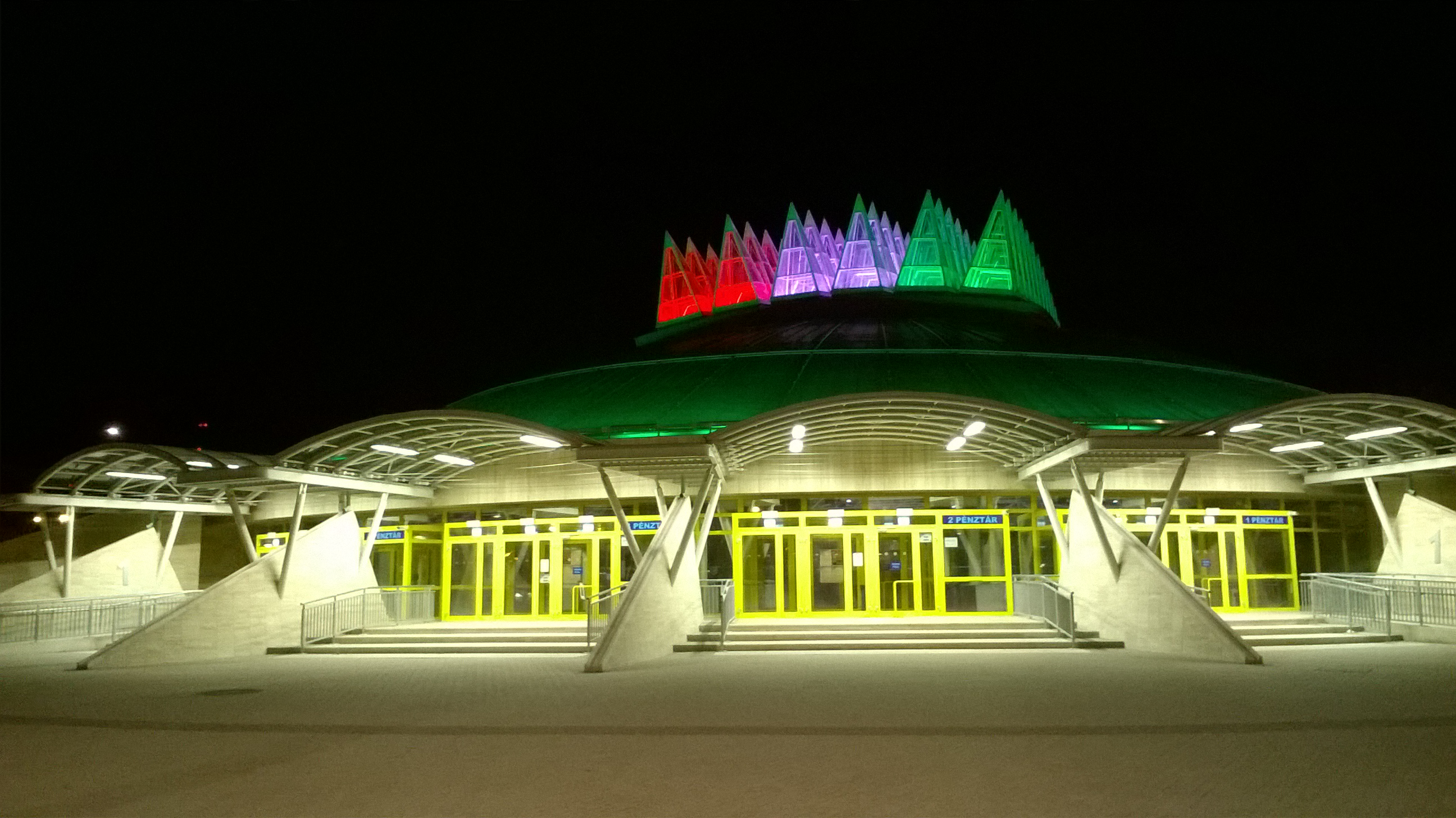 Budapest, Tüskecsarnok